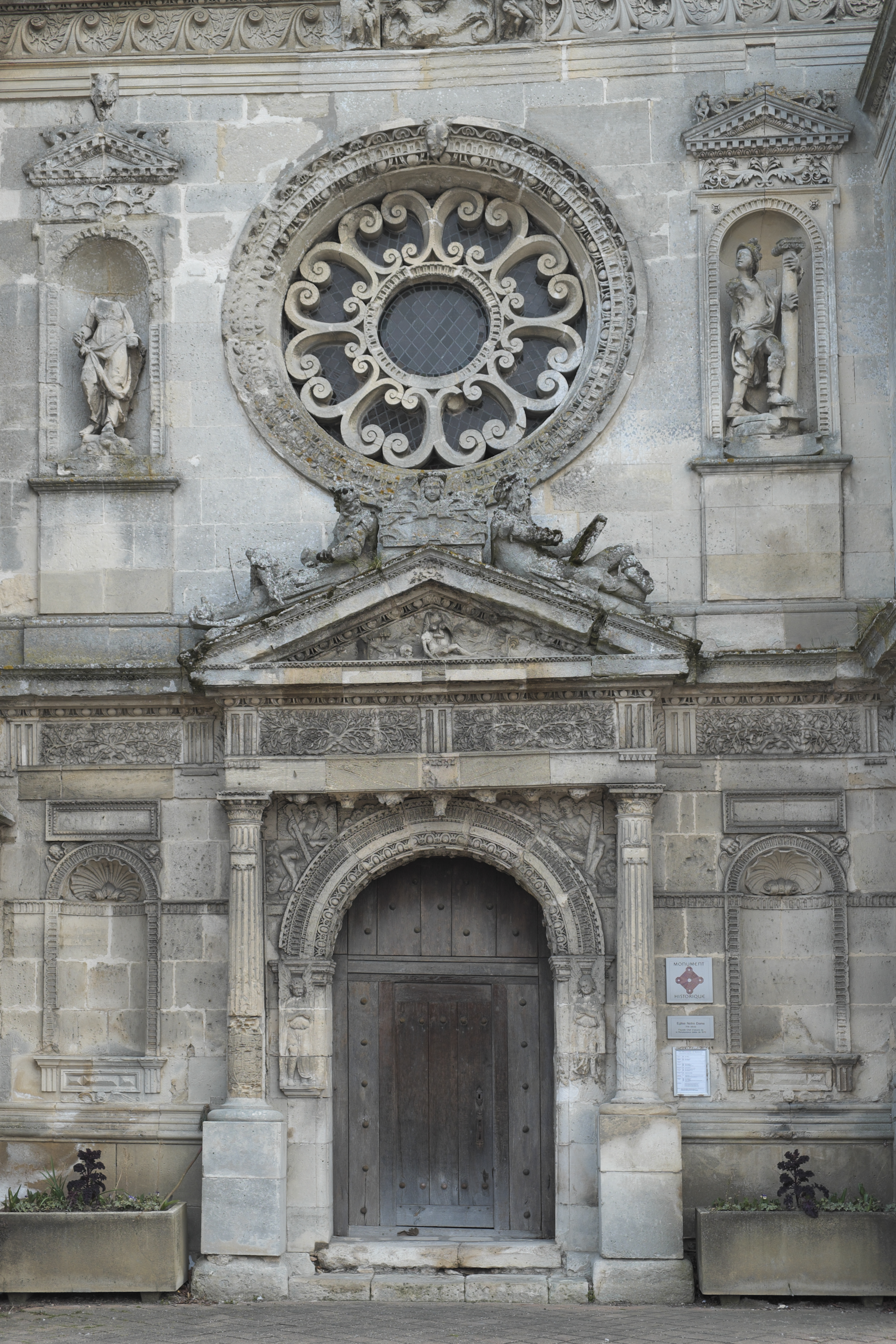 Katholische Kirche Notre-Dame (de la Nativité de la Vierge) in Othis im Département Seine-et-Marne (Région Île-de-France/Frankreich), Renaissanceportal an der Westfassade